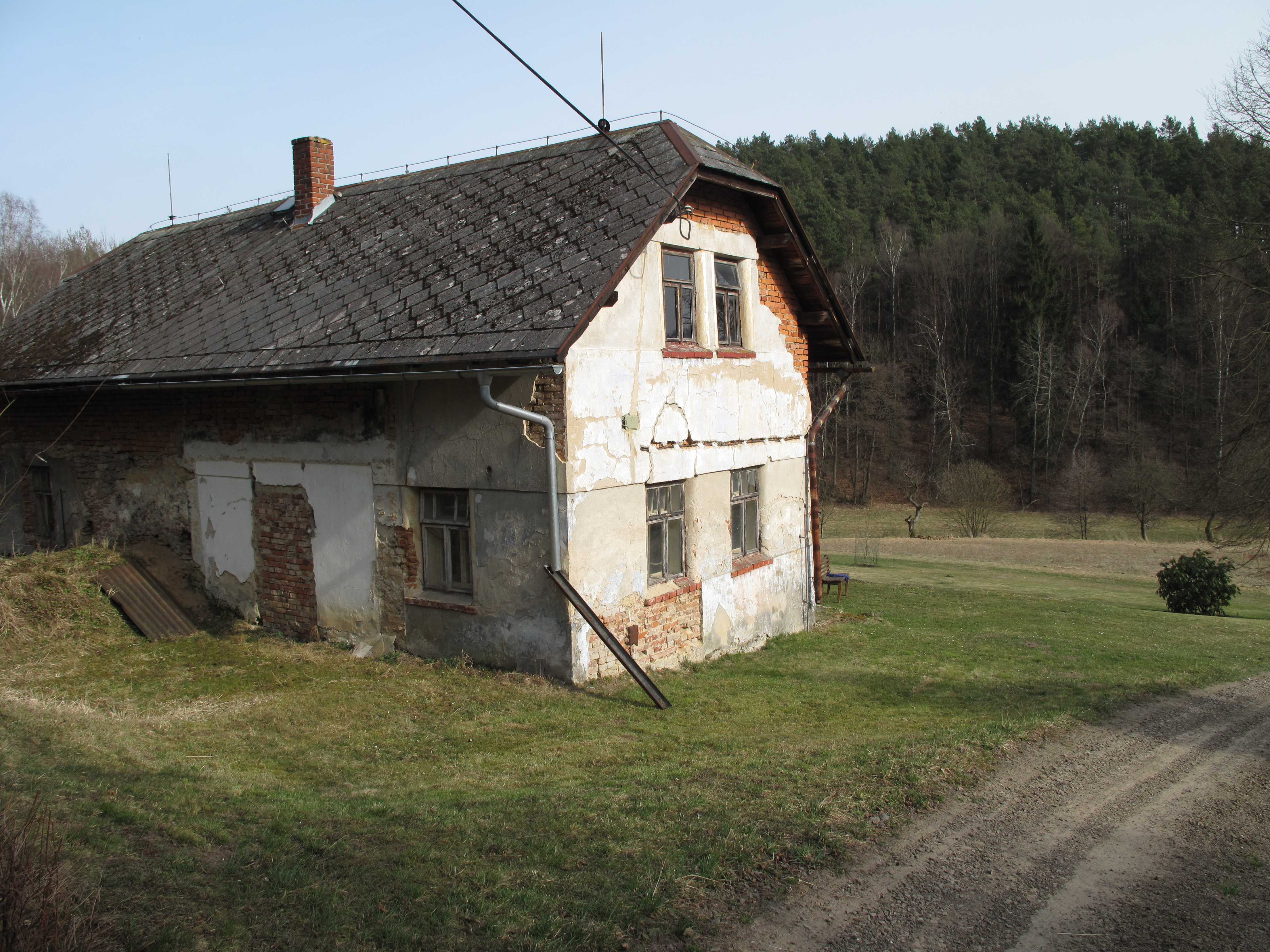 Dům v Dolečku. Okres Liberec, Česká republika.